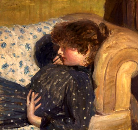 Girl on a Sοfa. Philip Wilson Steer. Óleo sobre lienzo. c. 1889